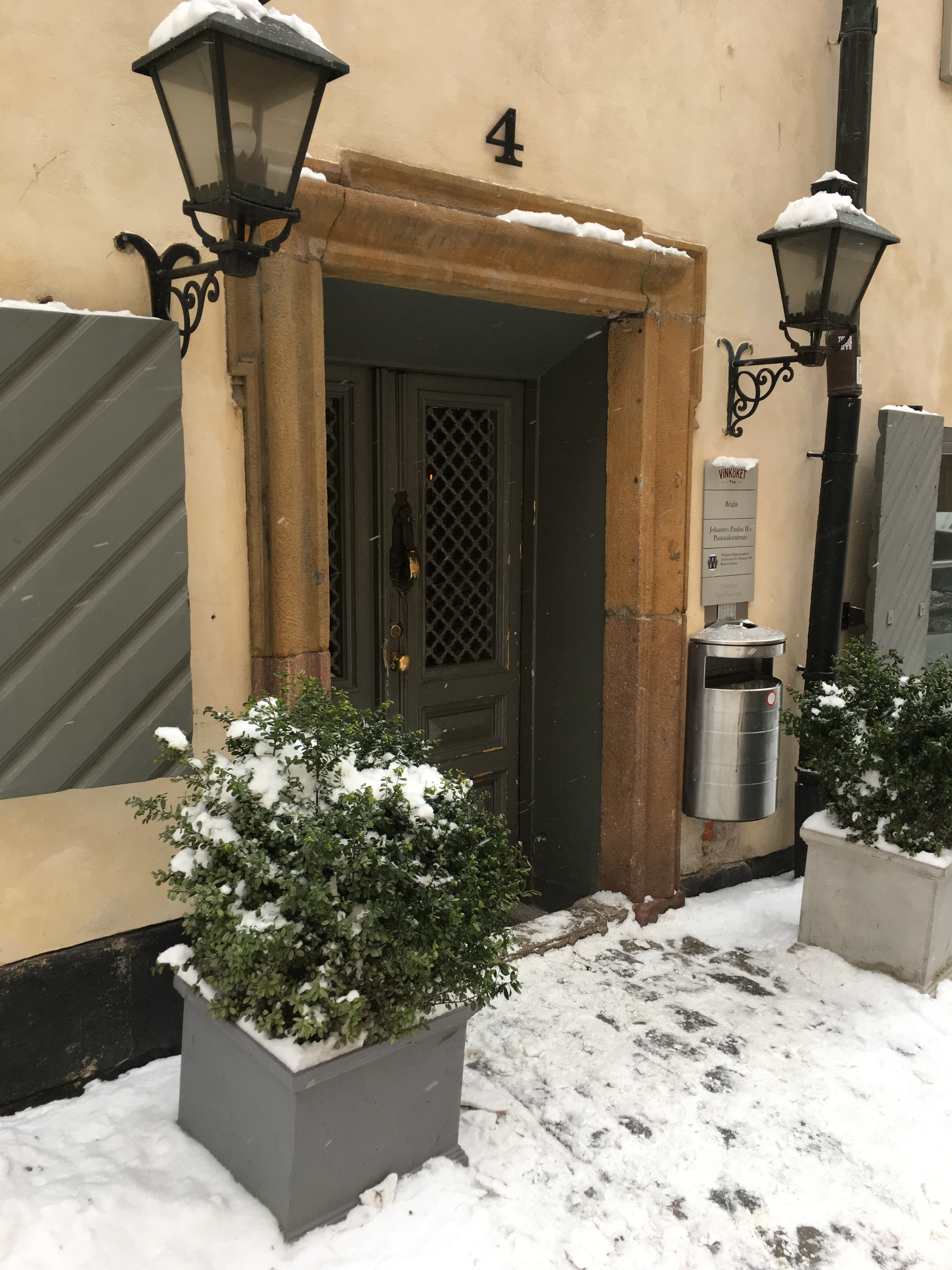 Caritas Sverige vid Brunnsgränd 4, i Gamla stan, Stockholm